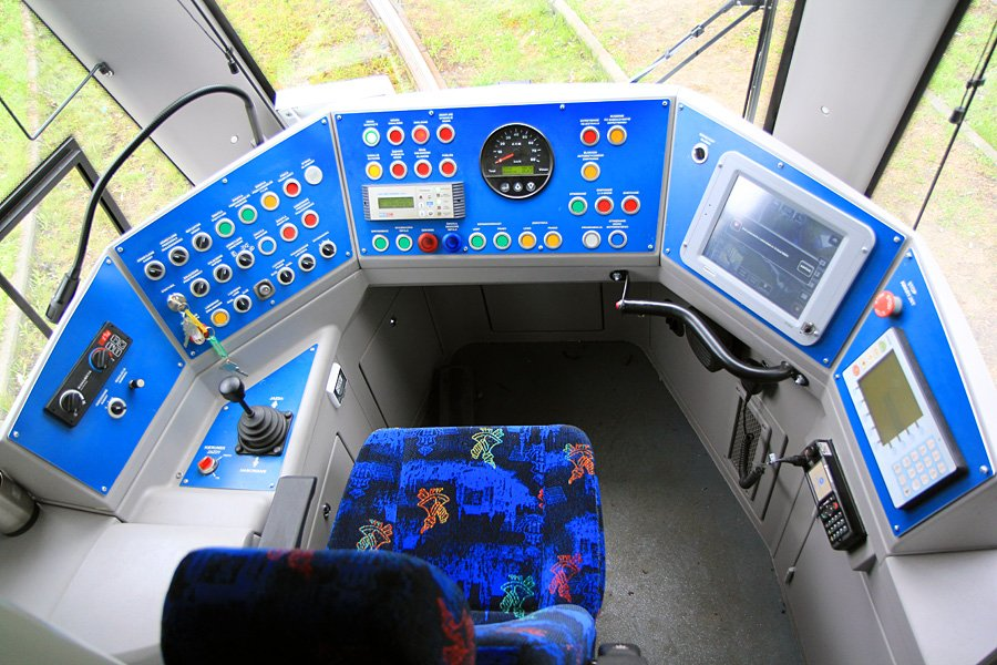 Pulpit motorniczego w całej okazałości. Uwagę zwraca brak pedałów, typowych dla wagonów generacji 105N.